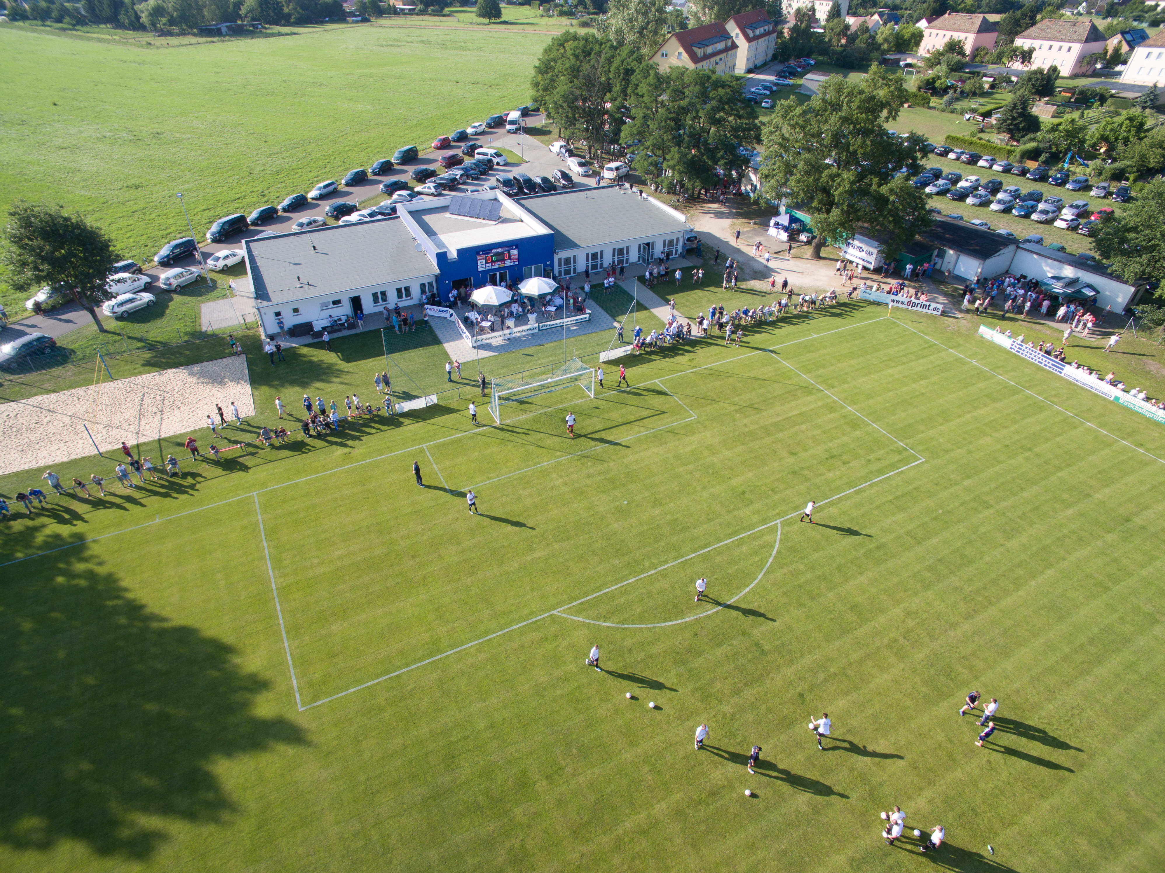 Luftbild aus dem Jahr 2017, mittlerweile gab es einige bauliche Veränderungen